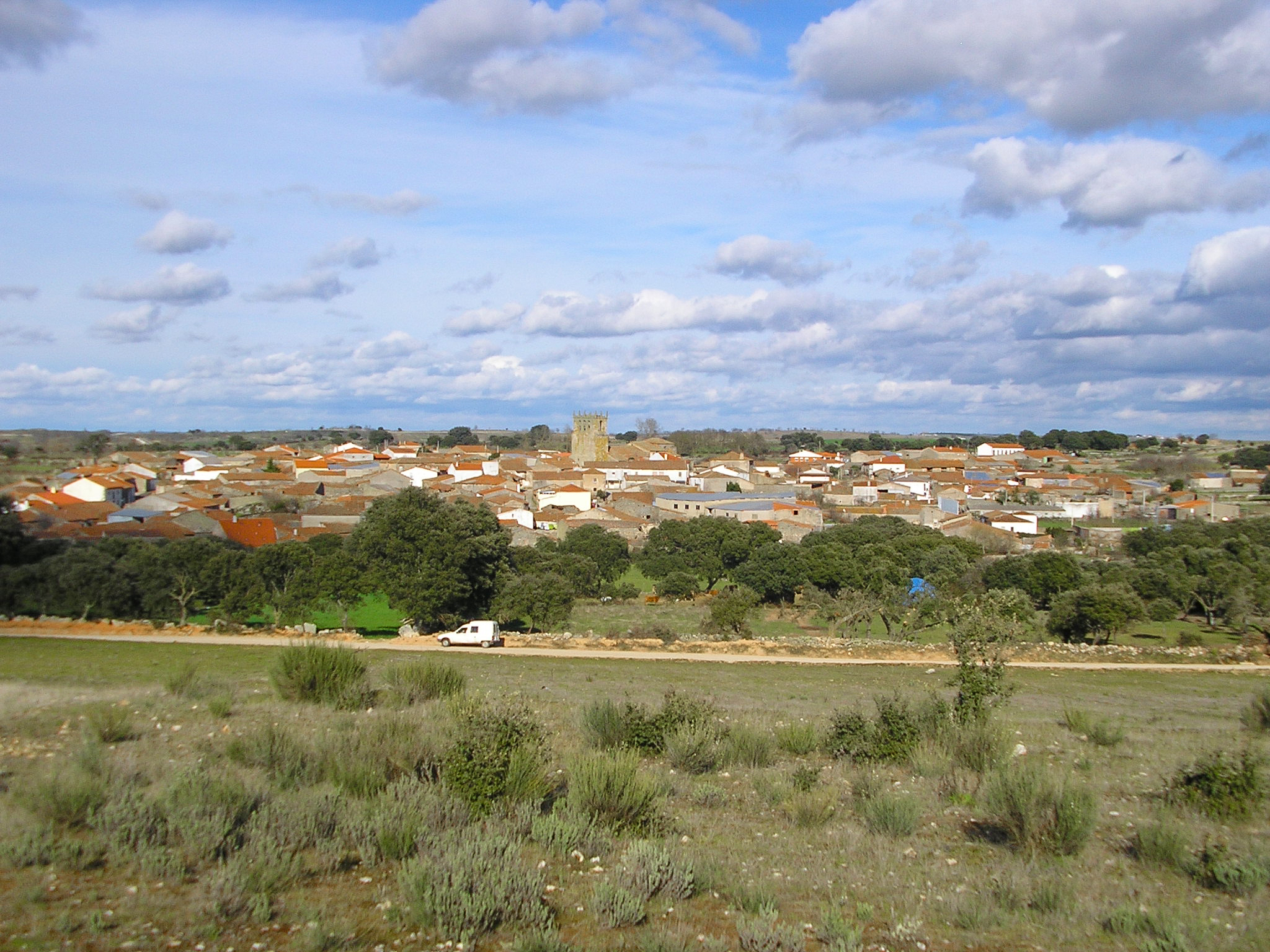 Estremeñu: Vista dende uno de los tesos